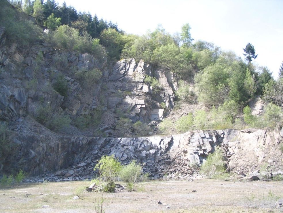 Thomm, Schiefersteinbruch